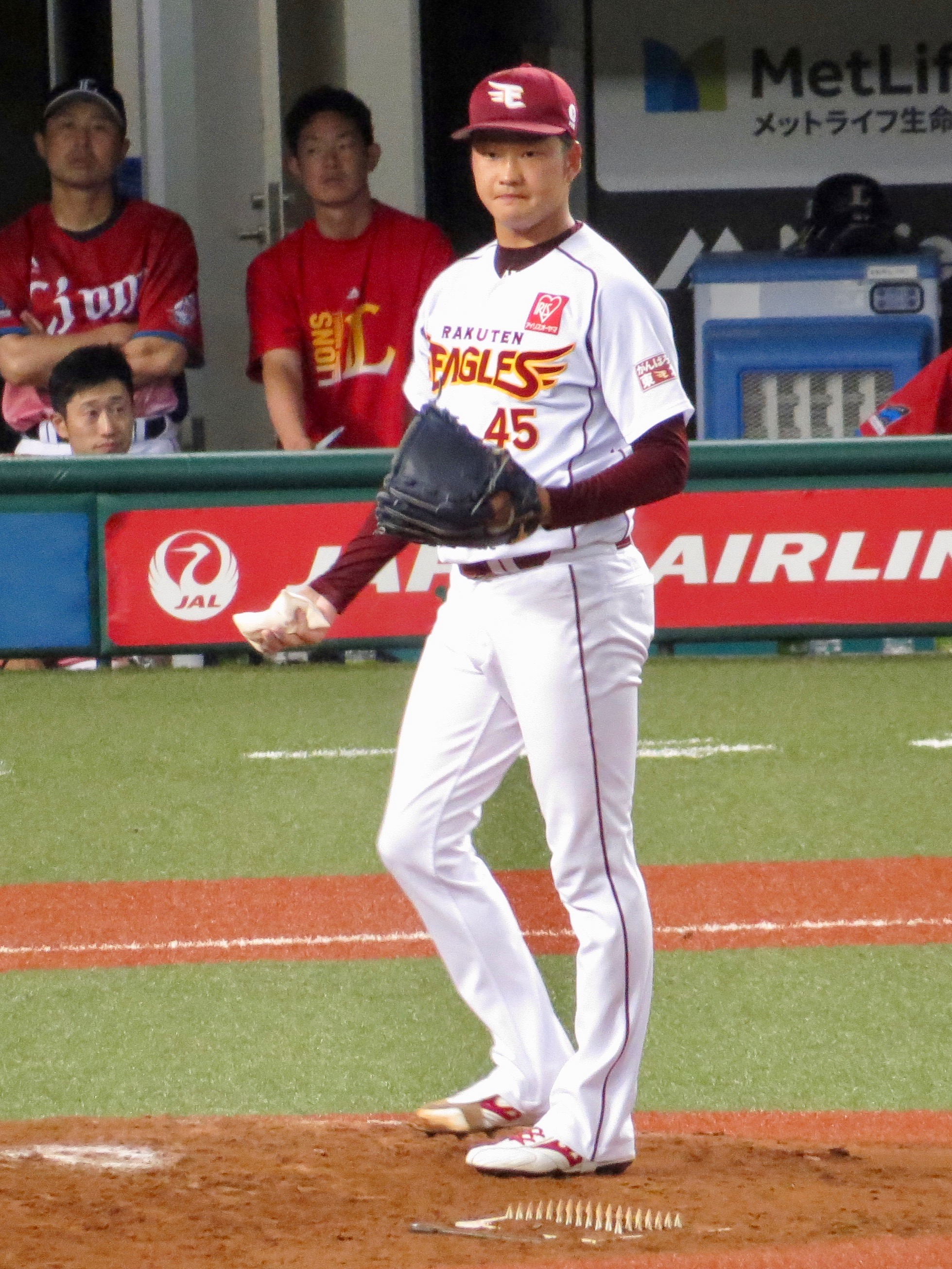 メットライフドームにて